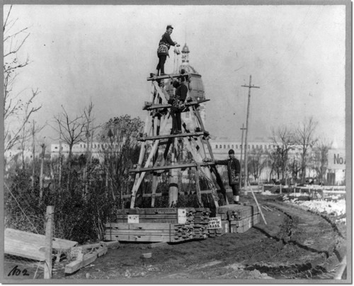 シカゴ万国博覧会(1893年)の日本館「鳳凰殿」建設中の職人たち